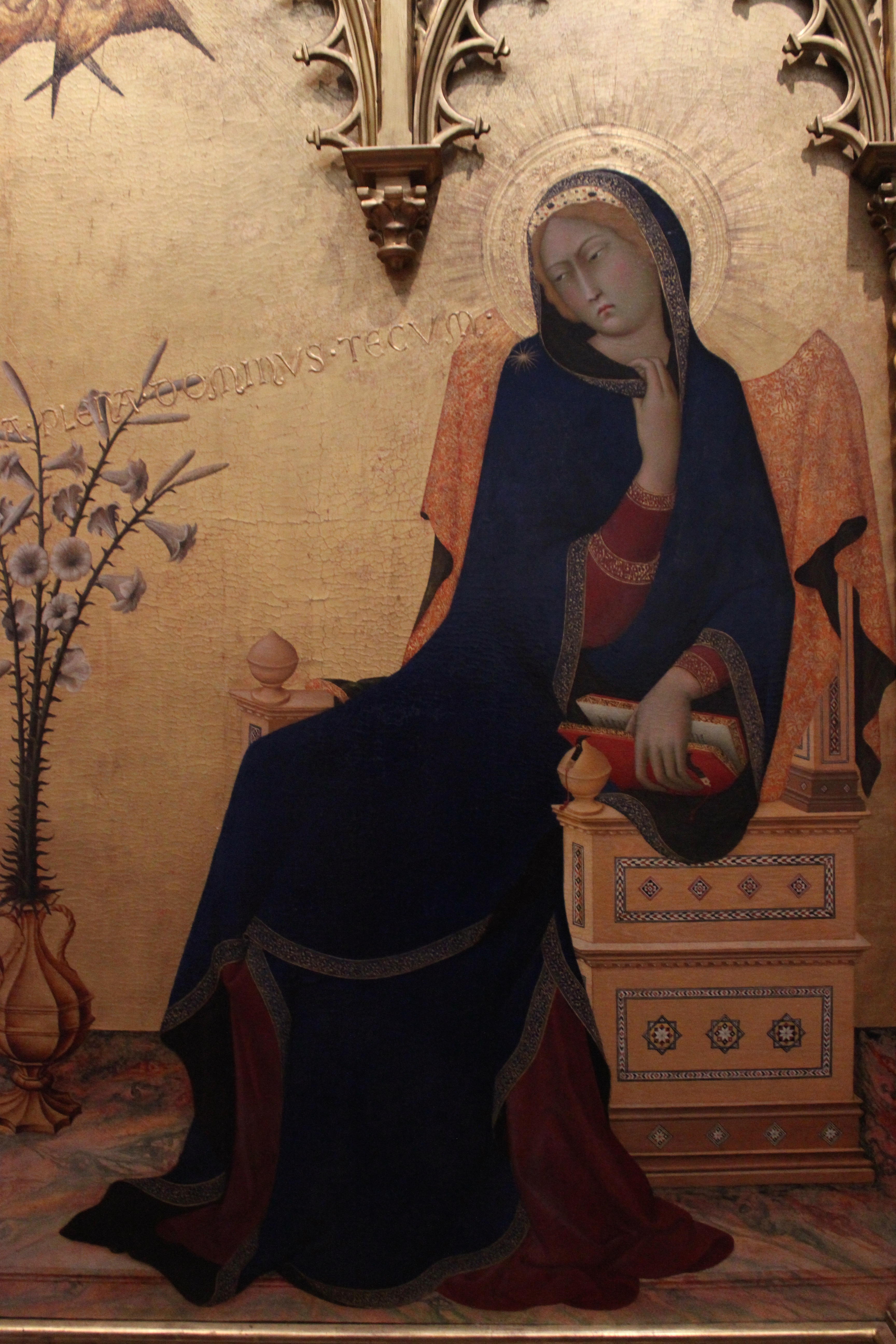 Simone Martini. Anunciación. Uffizi.